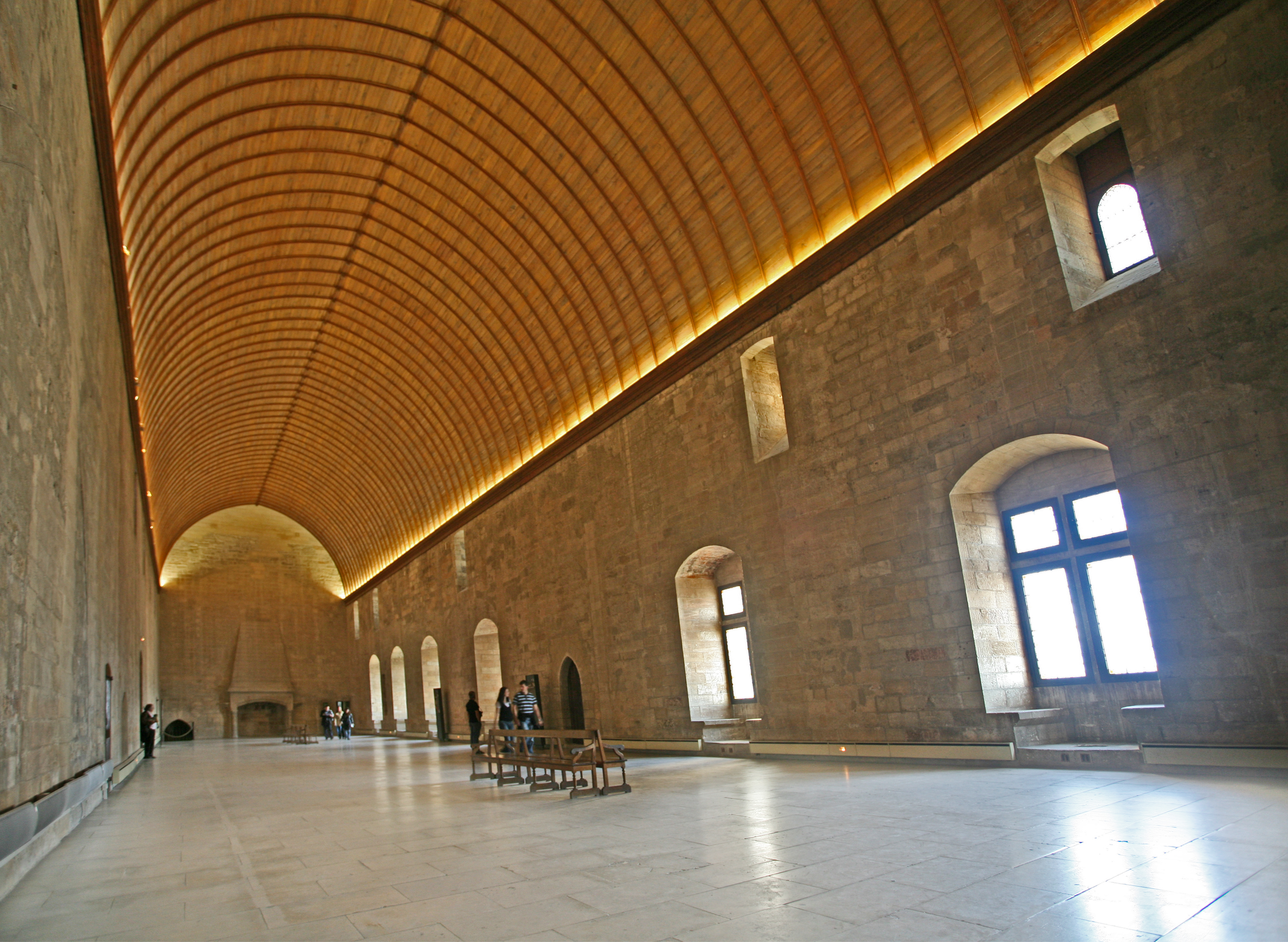 le Grand Tinel, Palais des Papes, Avignon, Vaucluse, France.